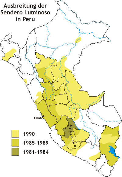 Sendero Luminoso, Ausbreitung in Peru